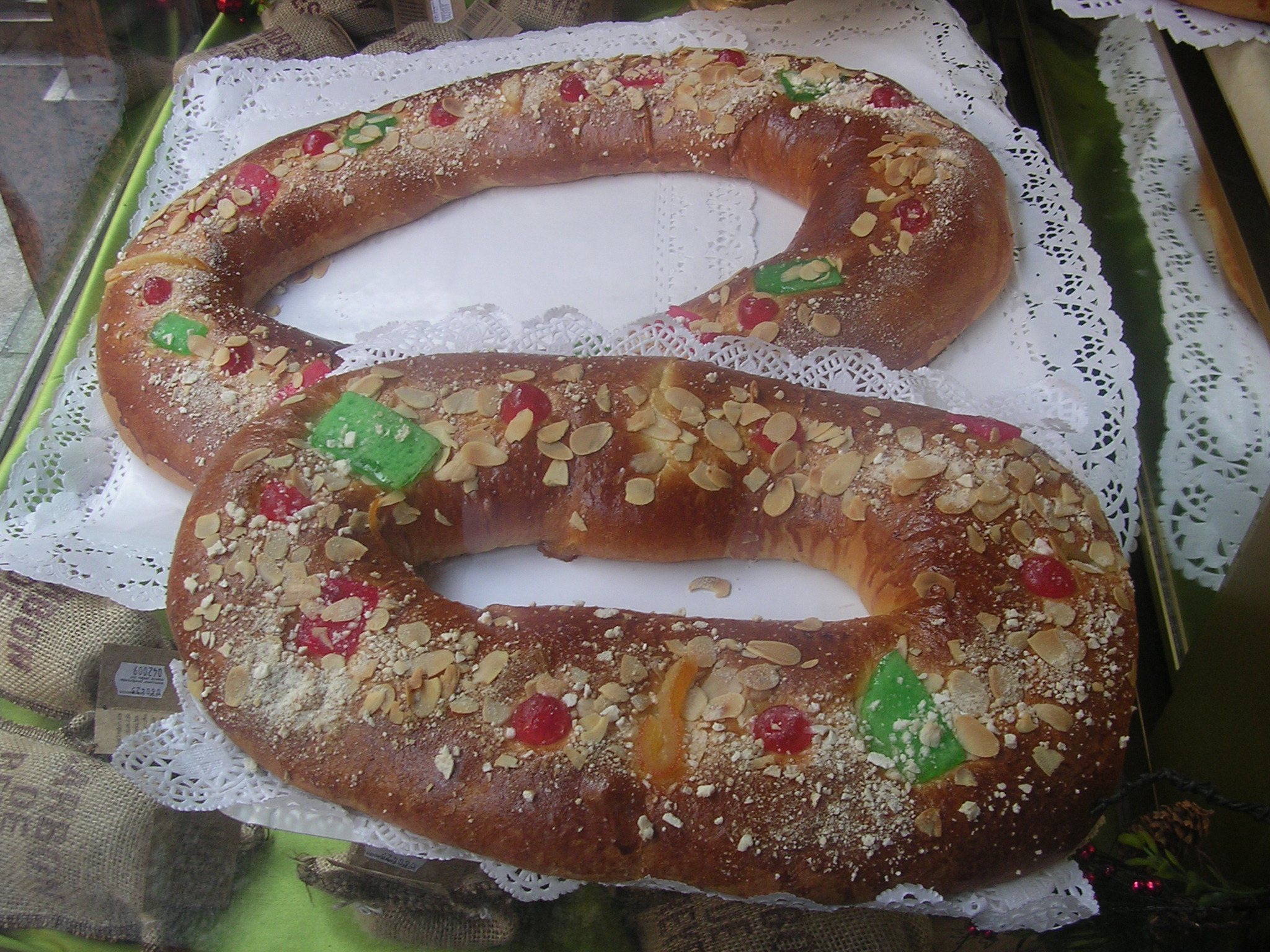 Roscón de reyes, procedente de Madrid (El Riojano)